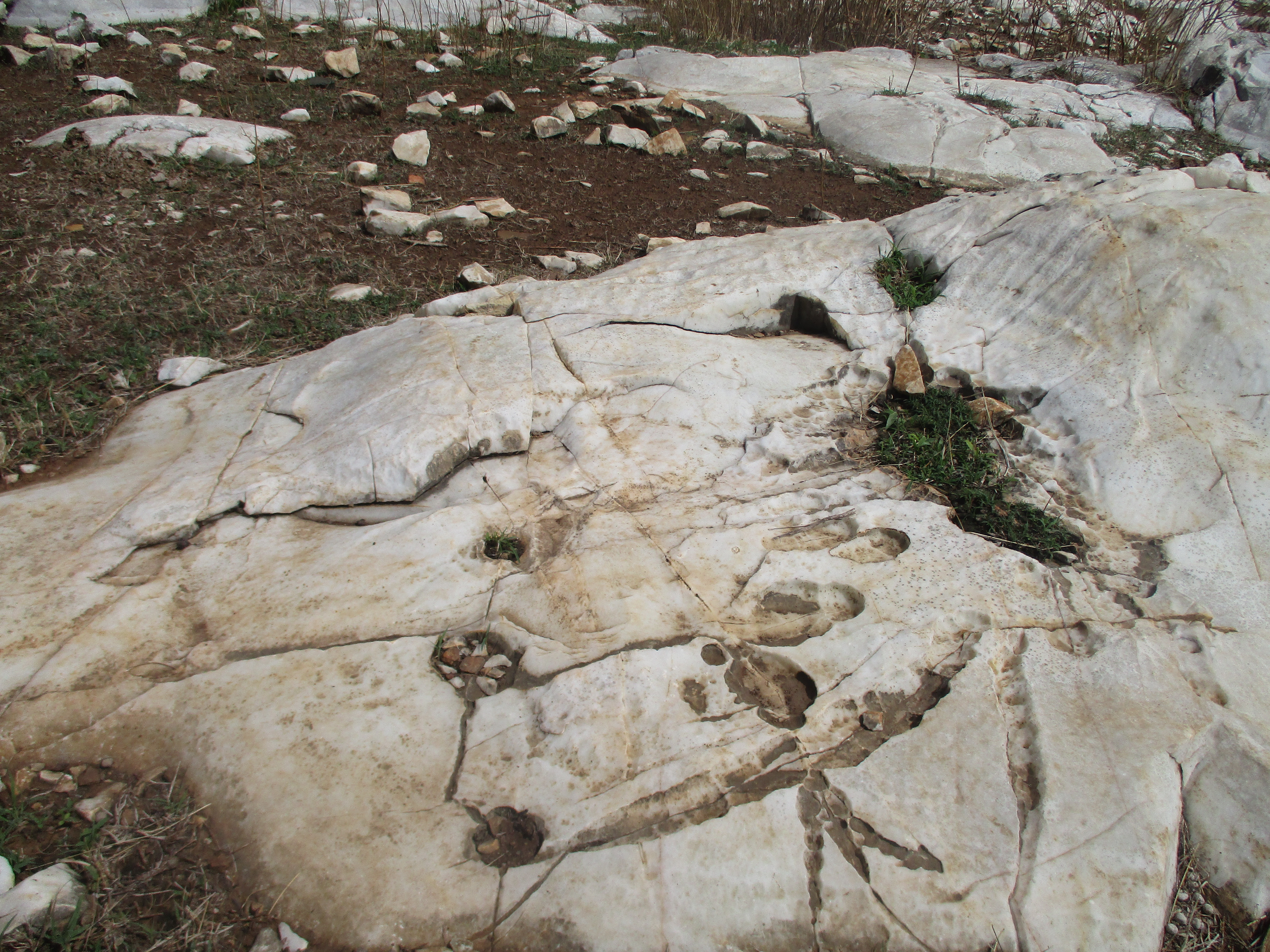 Les gravures rupestres du site archéologique de Bidzar, situées sur la route nationale numéro 1 entre Figuil et Maroua. Gravures ayant plusieurs siècles d'existences.